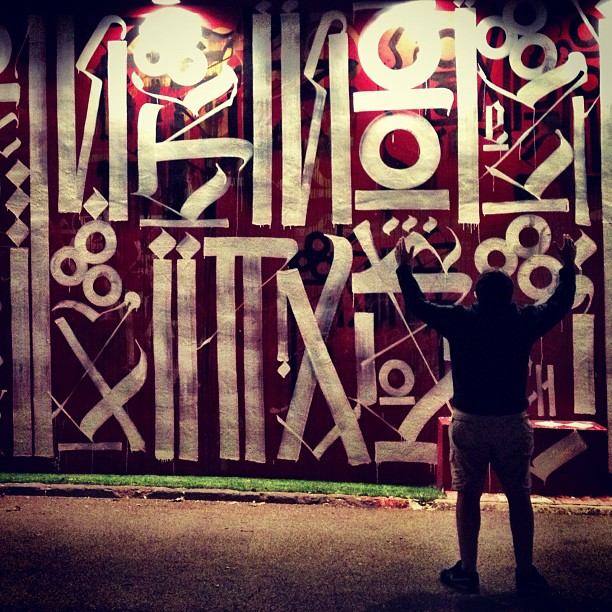 RETNA Wynwood Walls